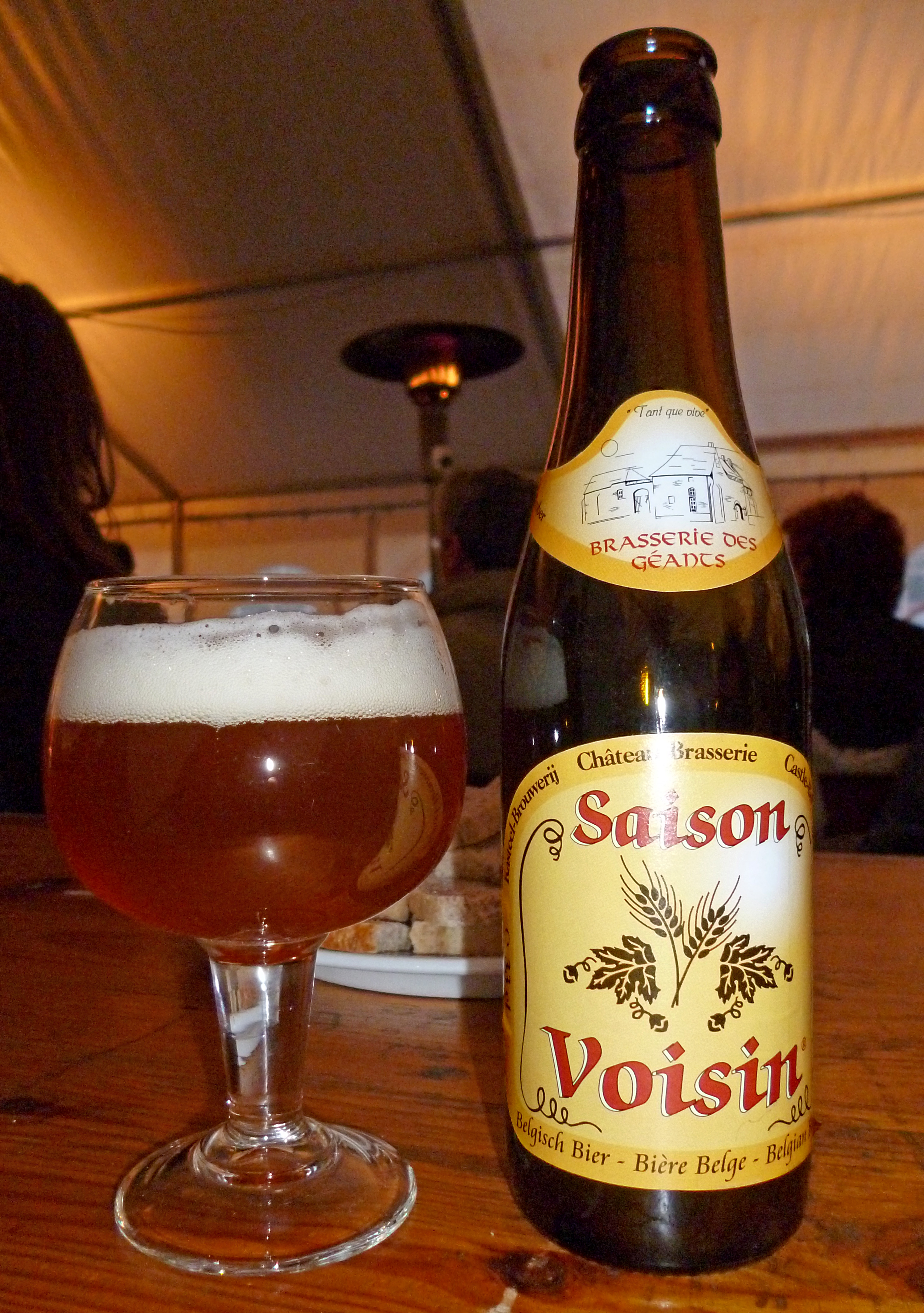 Saison Voisin